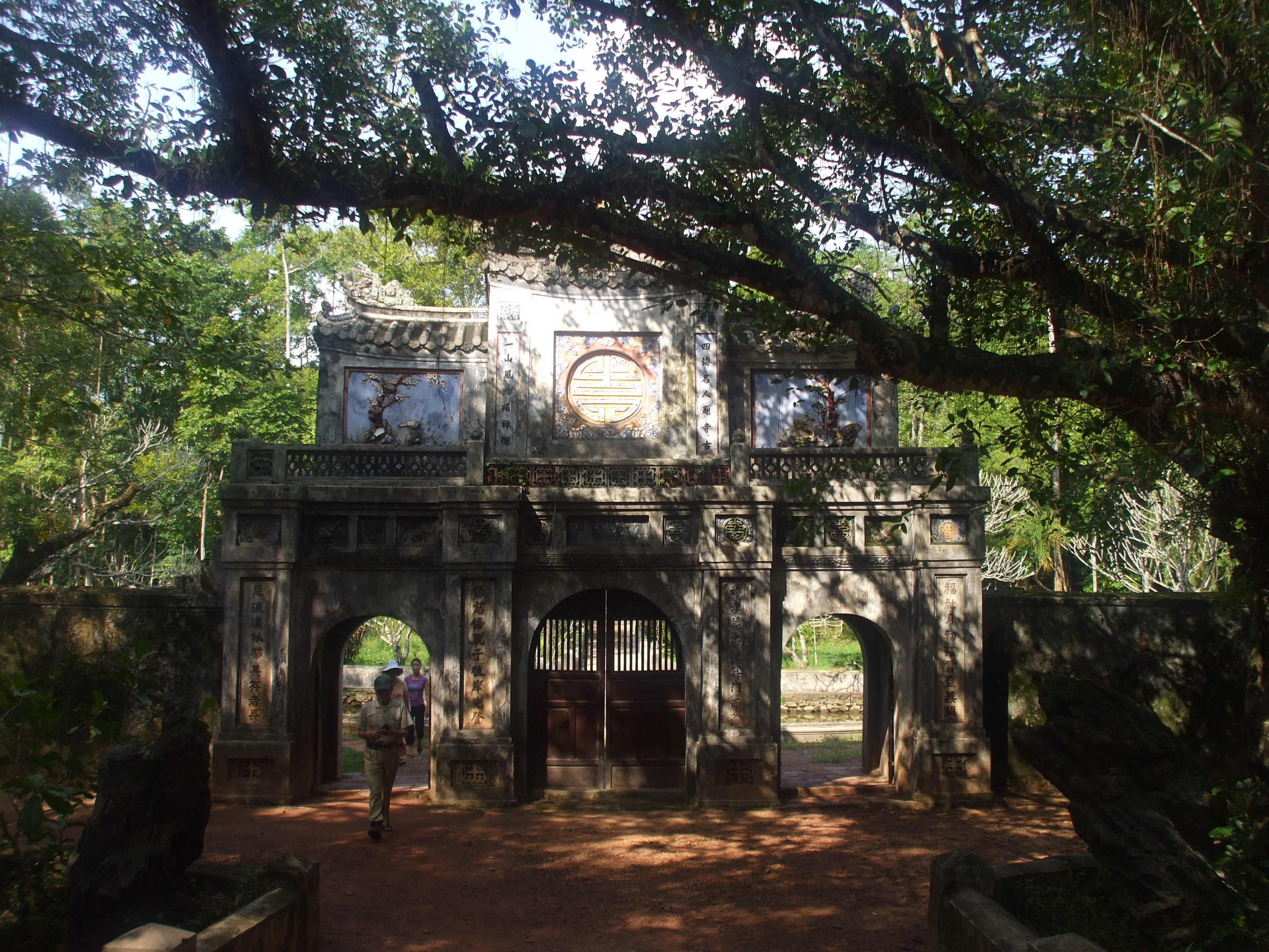 Cổng chùa Từ Hiếu tại thành phố Huế (Việt Nam).